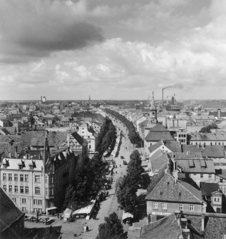 Ostpreussen - Tilsit Reg.Bez. Gumbinnen; deutsche Strasse Quelle : Haro Schumacher vor 1945